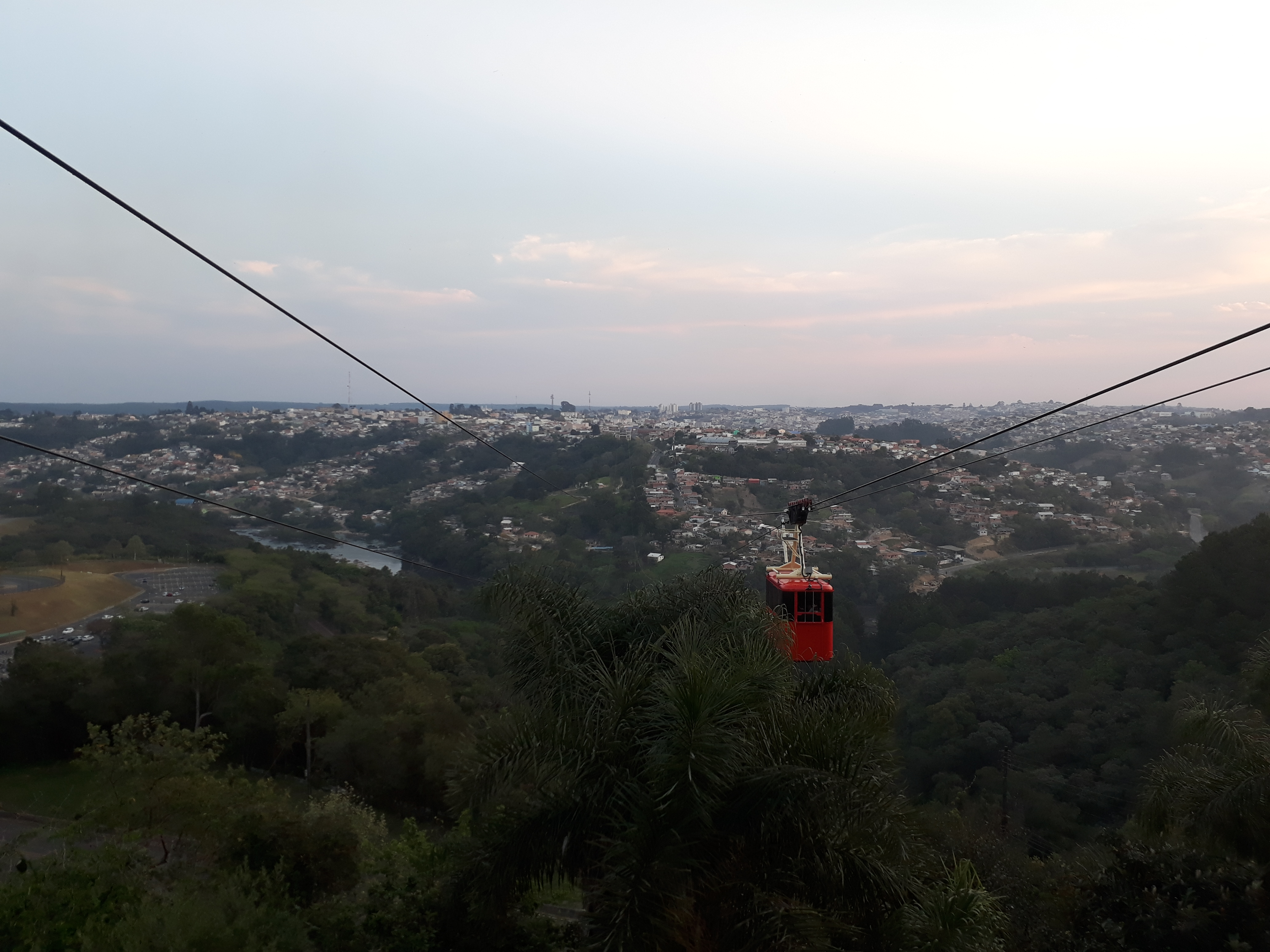 Vista do bonde aéreo de Telêmaco Borba, teleférico conhecido como "bondinho".